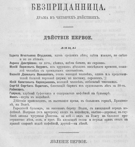 А. Н. Островский. "Бесприданница". Первая публикация (журнал "Отечественные записки", 1879, № 1)